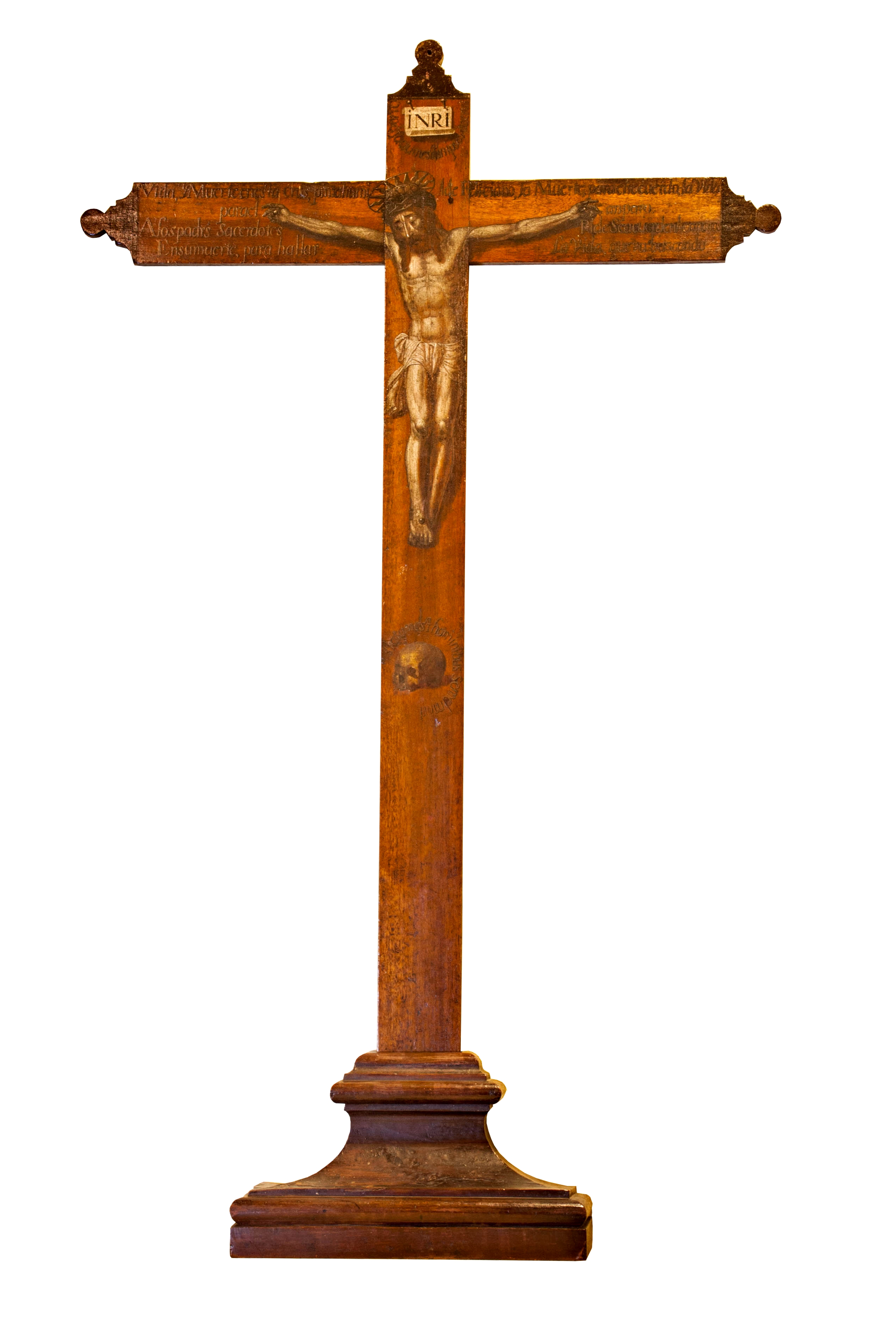 Pintado por Feliciano de Abreu, discípulo de Gaspar de Quevedo, sobre la denominada Cruz Verde y perteneciente a la cofradía de la Misericordia.